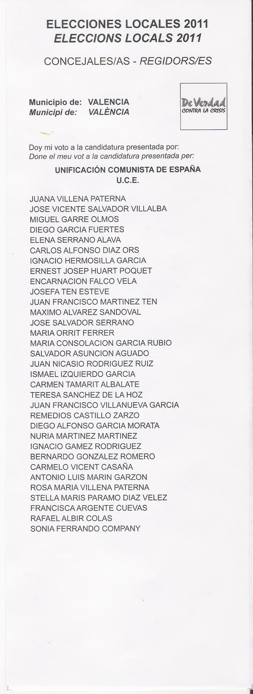 Papeleta electoral de Unificación Comunista de España para las elecciones municipales del 22 de mayo de 2011 en el municipio de Valencia.